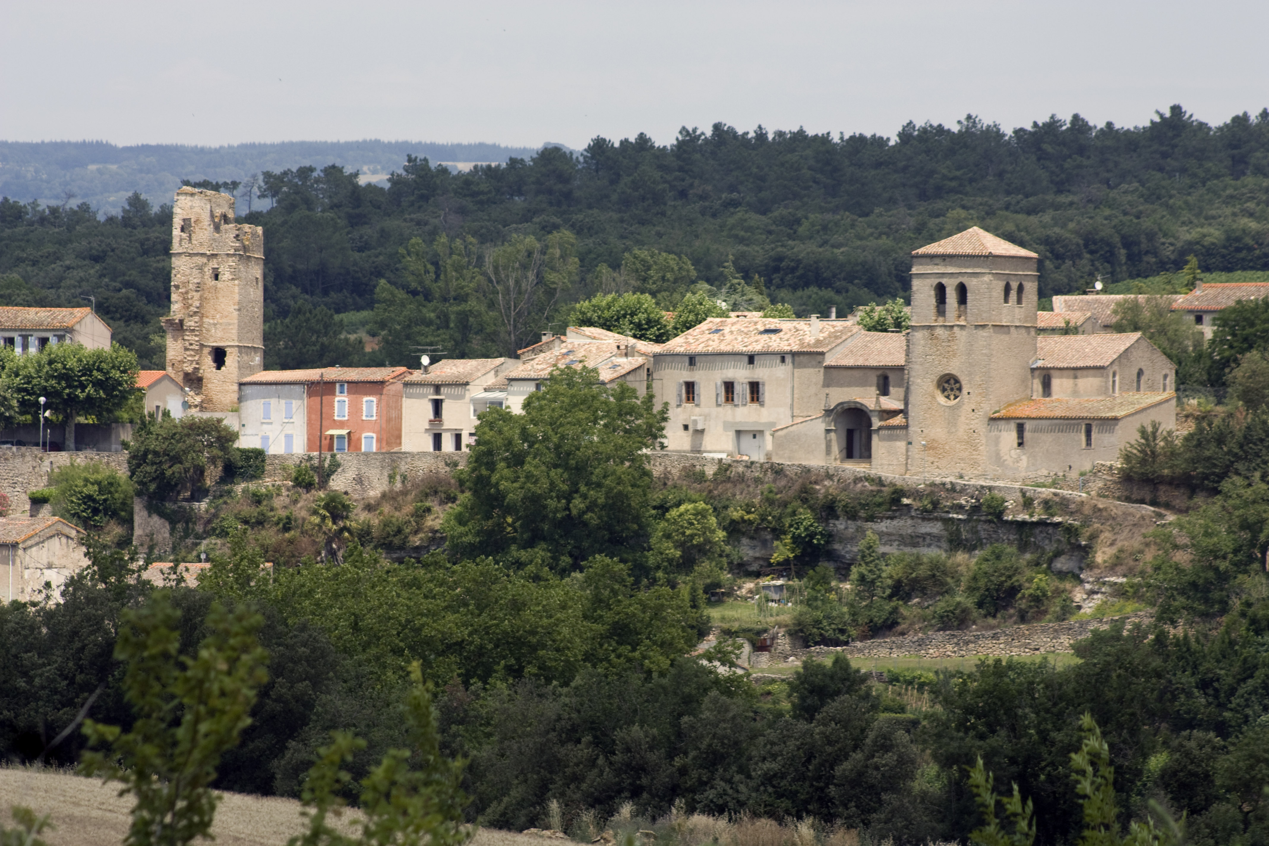 Général view of Saint Martin le Vieil.